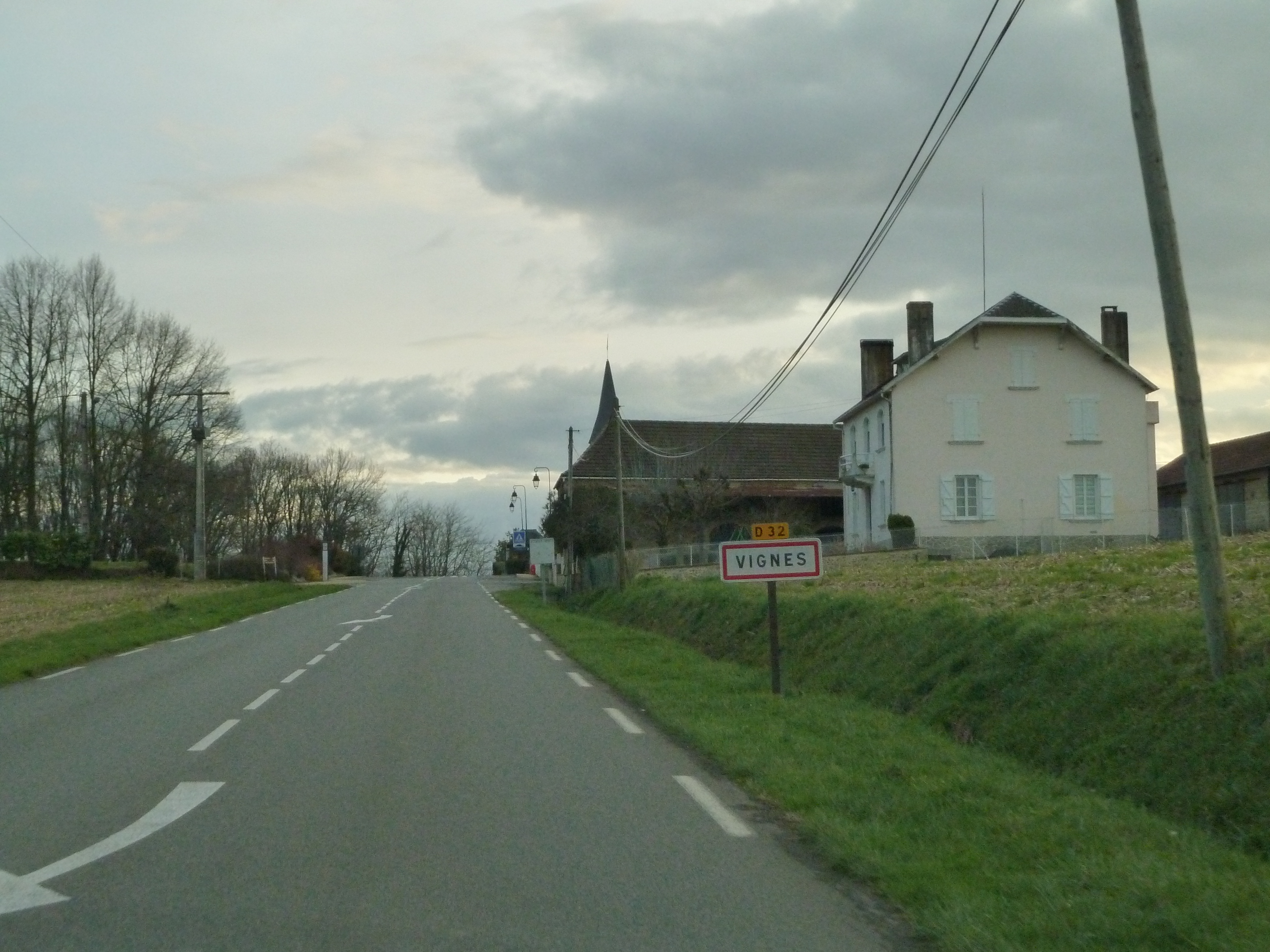 Entrée dans Vignes (Pyrénées-Atlantiques)